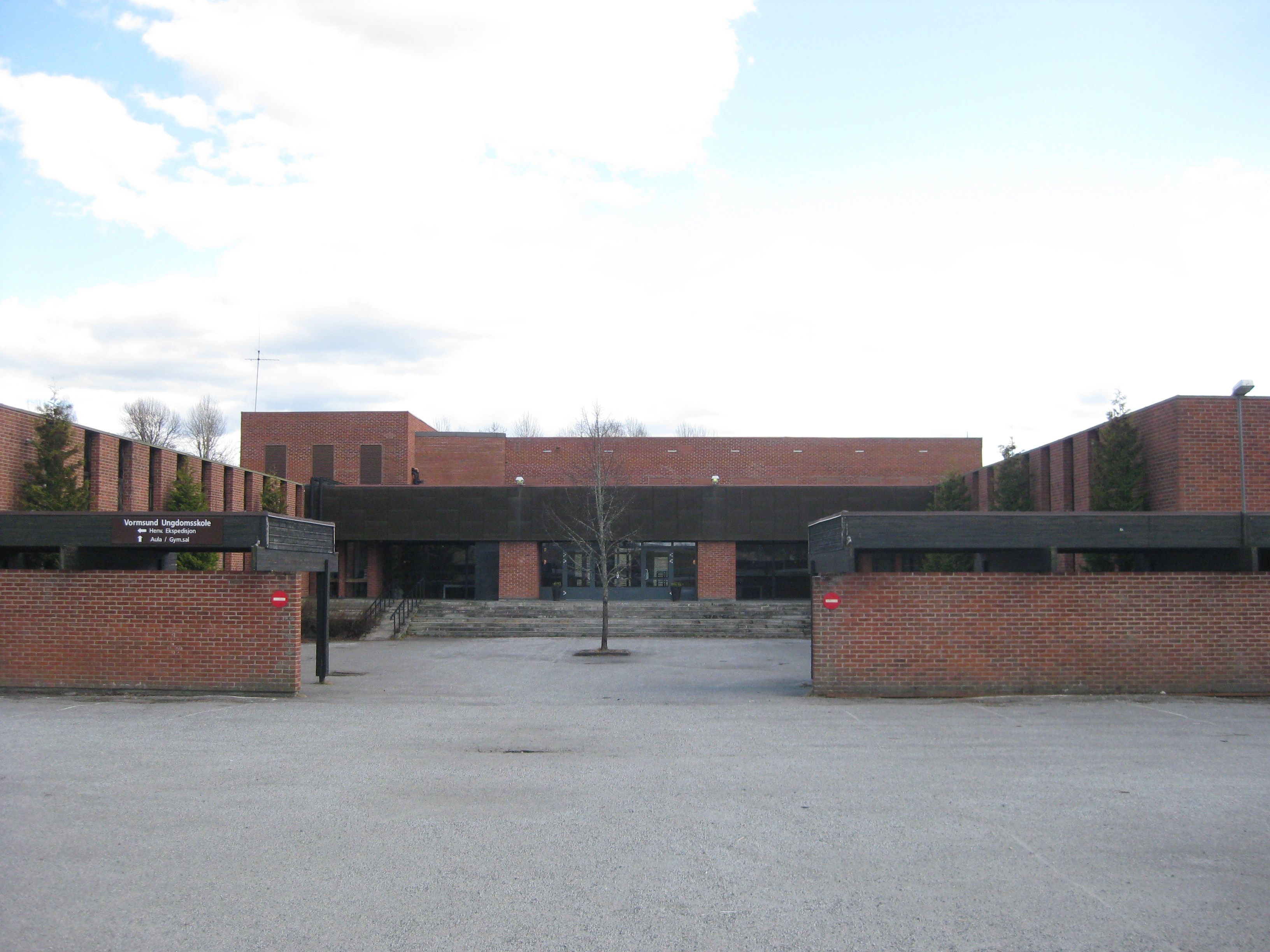 Vormsund ungdomsskole.